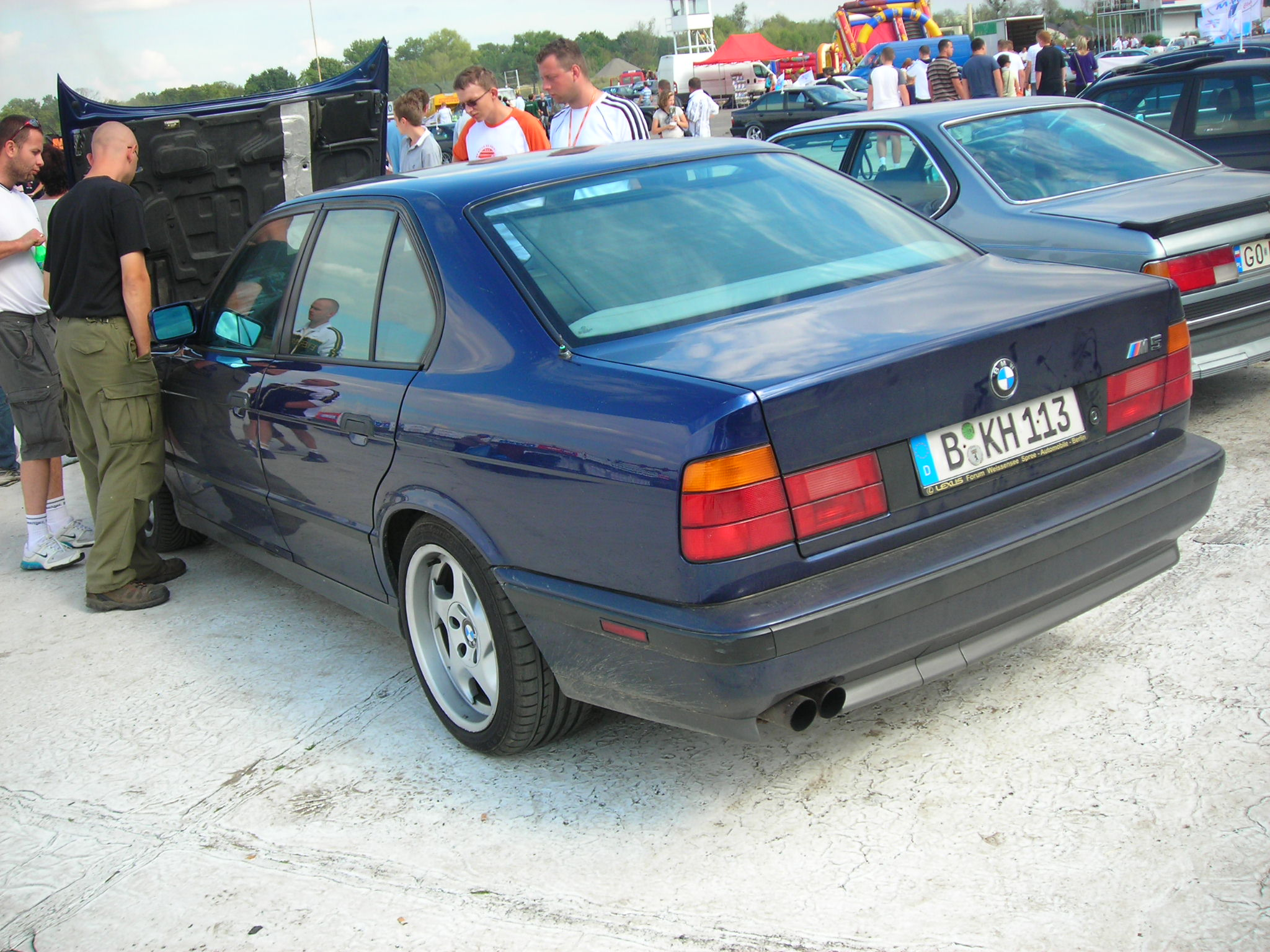 M5 e34 3,6l; shadowline; Zlot BMW M Power Club w Toruniu.